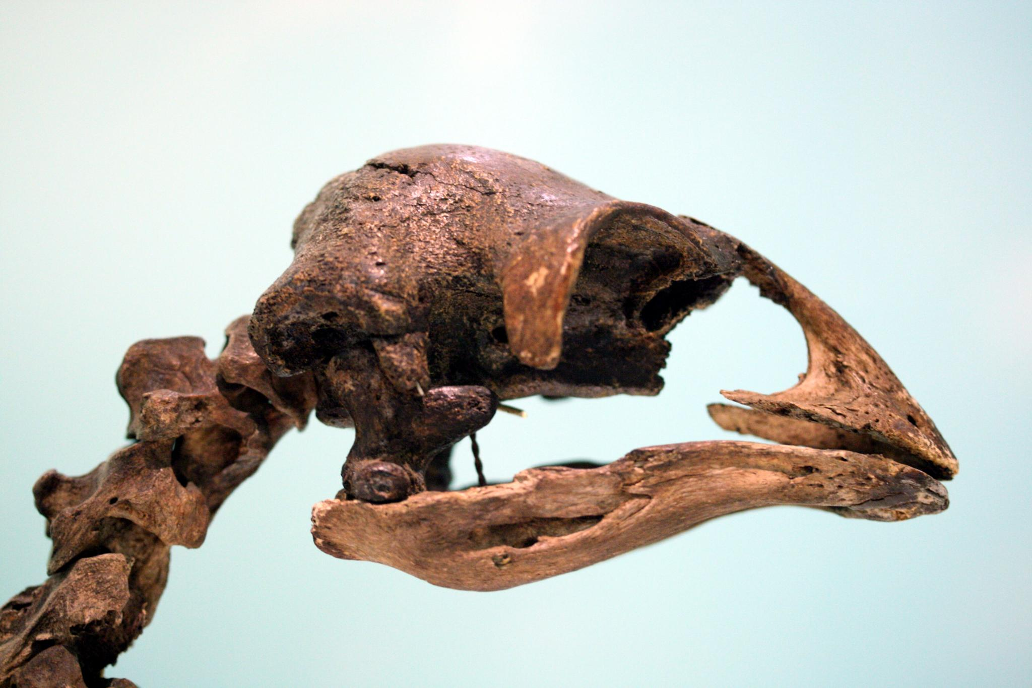 Moa-Sch�del. Dauerausstellung: �Quagga & Dodo. Bedroht und ausgestorben� im Naturhistorischen Museum Basel.